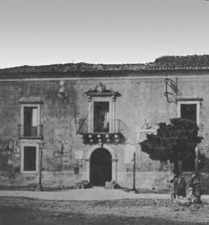 Foto del Municipio di Paternò (già Palazzo Alessi) risalente alla fine del XIX secolo